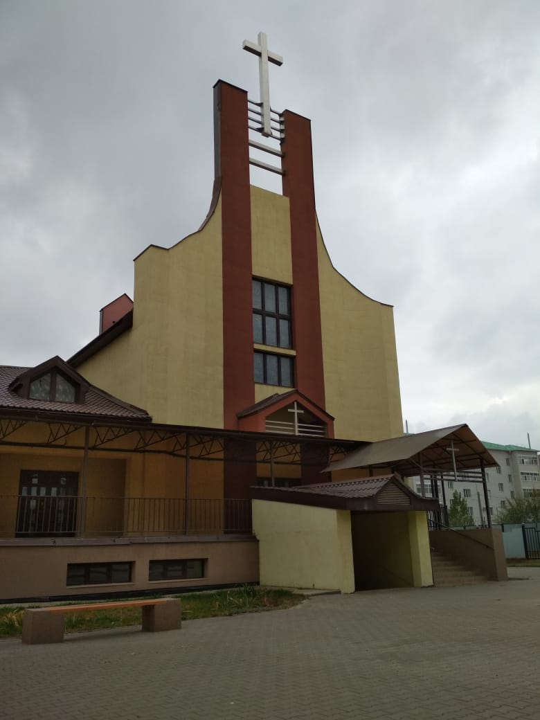 Uralski kościół